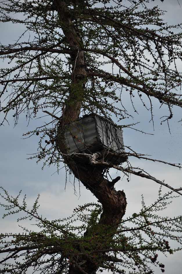 Нганасанское детское захоронение на дереве в окрестностях посёлка Усть-Авам.